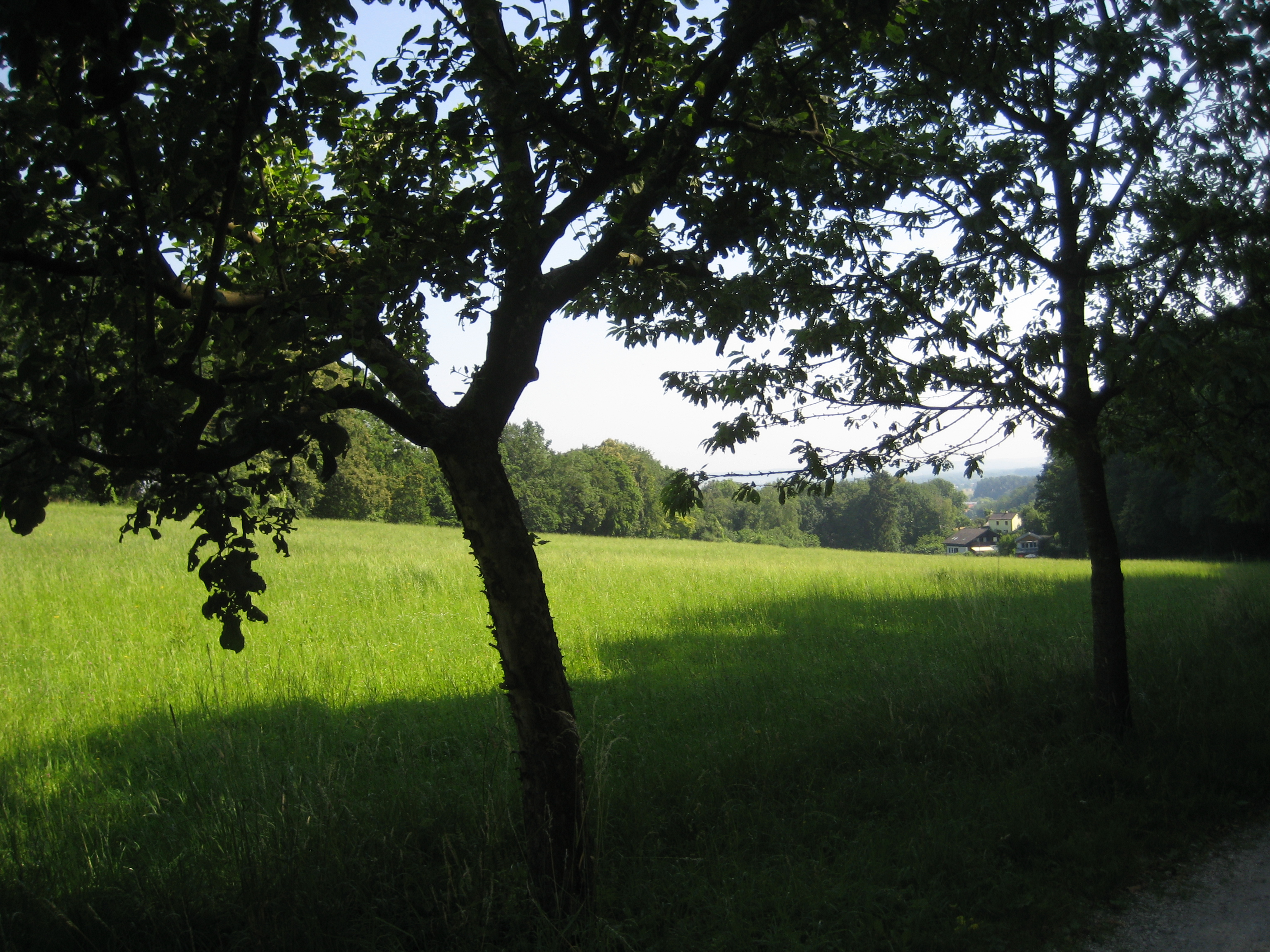 (LSG:BY-LSG-00301.01)_Schutz von Landschaftsteilen der Isar-Hangleiten zwischen B 299 neu und Schweinbachtal